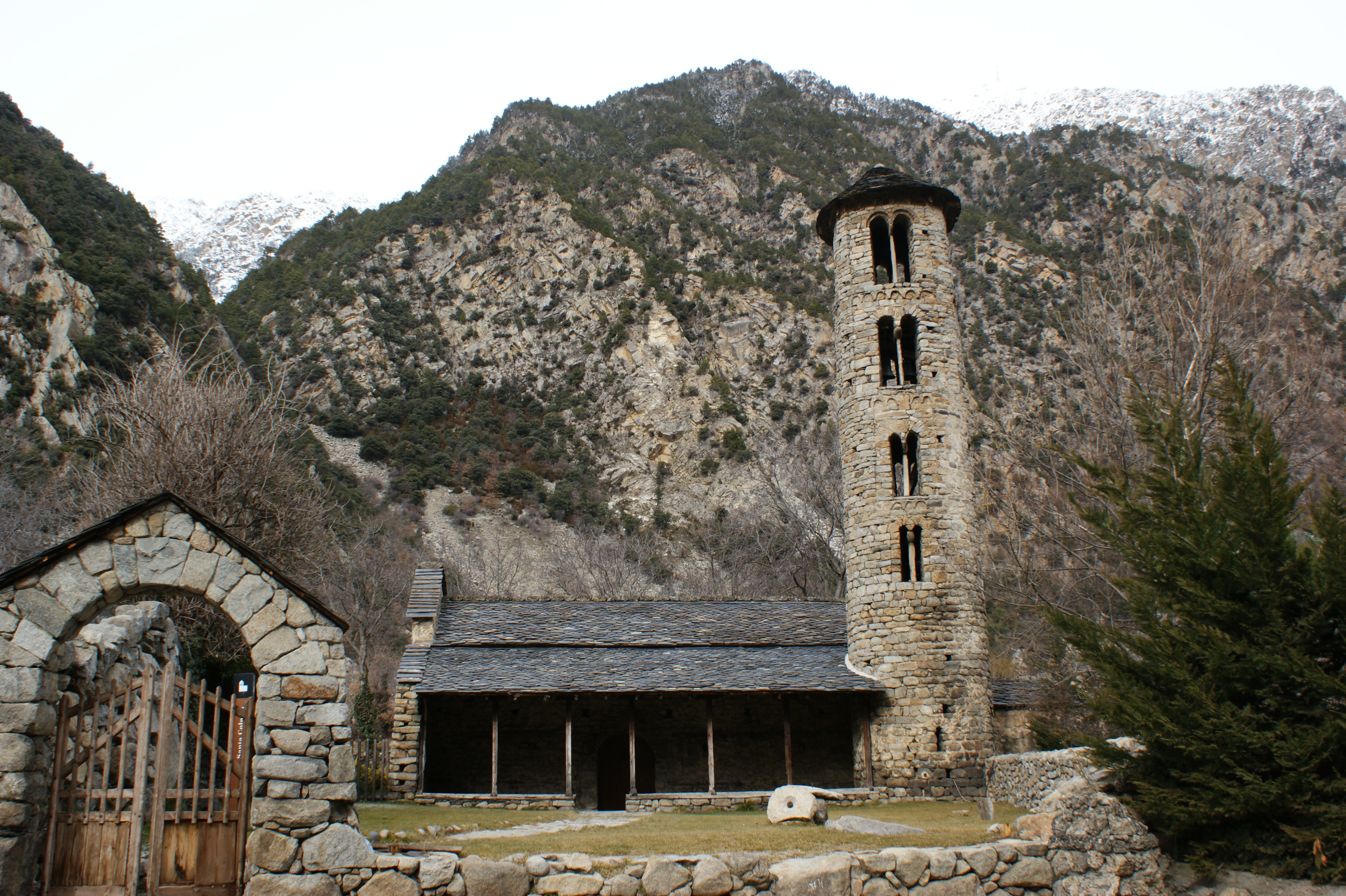 Església de Santa Coloma